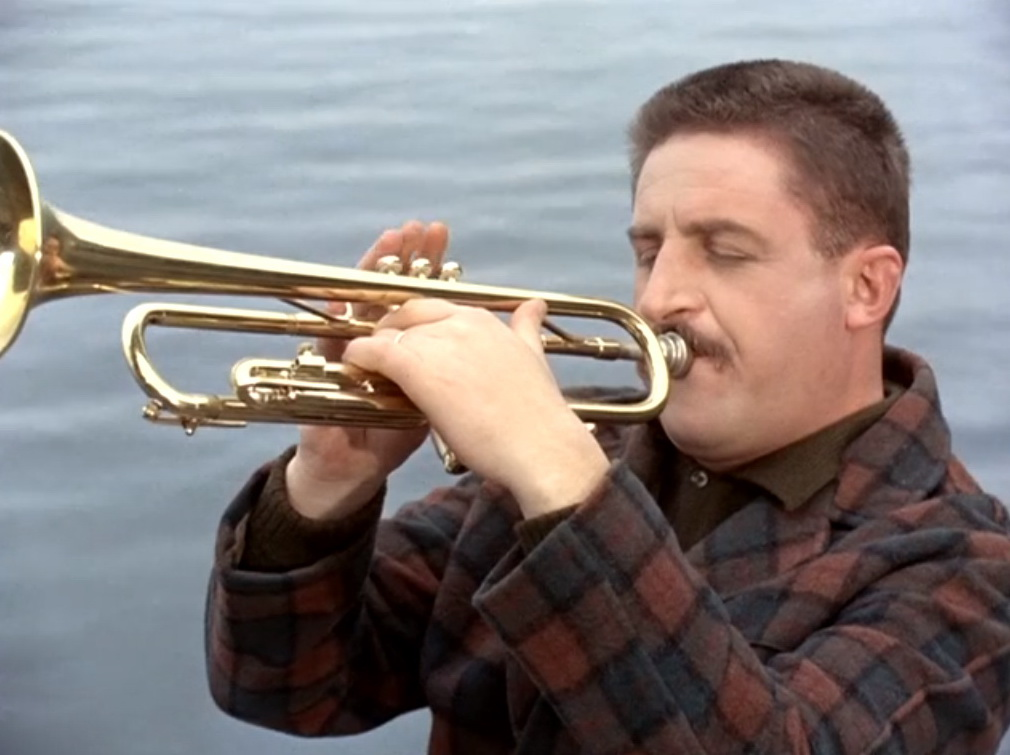 Screenshot dal film Viale della canzone (1965)